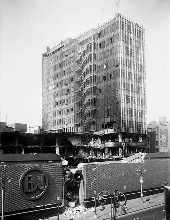 Fotografía que forma parte del tríptico con el Sergio Urday, ganó el tercer puesto en el concurso Pasaporte para un Artista, organizado por la embajada de Francia en Perú. El incendio del Banco de La Nación, donde murieron 6 guardias de seguridad del Banco, fue provocado por explosiones en el interior del edificio durante la Marcha de los Cuatro Suyos el 28 de julio de 2000. La sala penal de Lima condenó a Vladimiro Montesinos a 10 de prisión por delito contra la seguridad pública y peculado. Junto a él, otros altos mandos policiales fueron sentenciados.